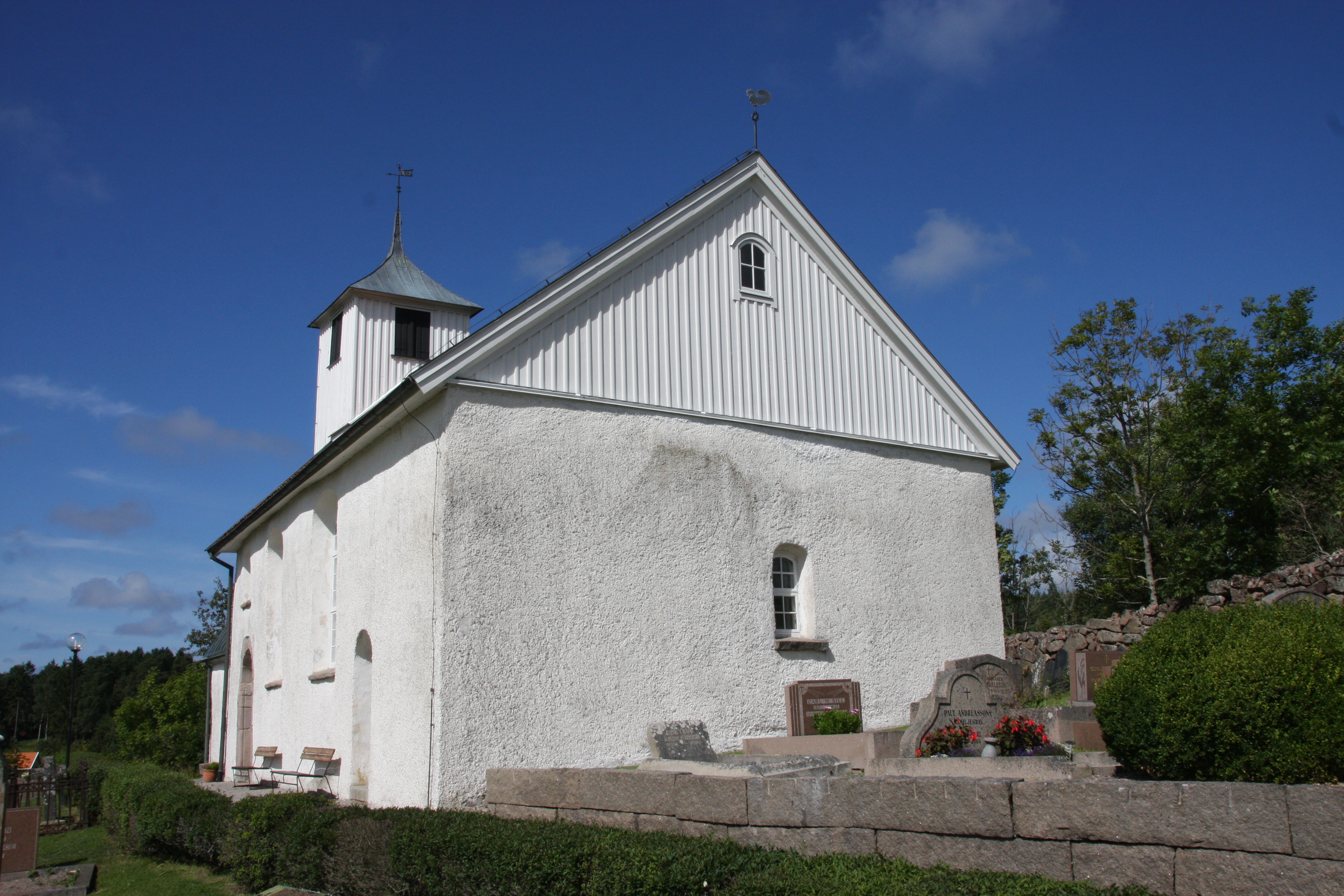 Bottna kyrka i Tanums kommun, Bohuslen.